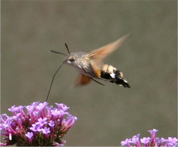 Taubenschwänzchen fotografiert 2006 bei Würzburg